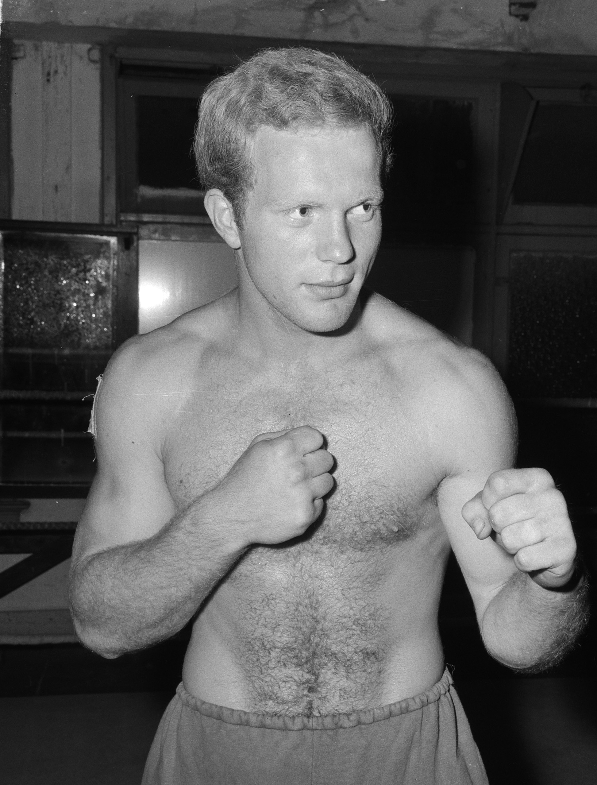 Lubbers (bokser) tijdens training kandiaat Olympische spelen